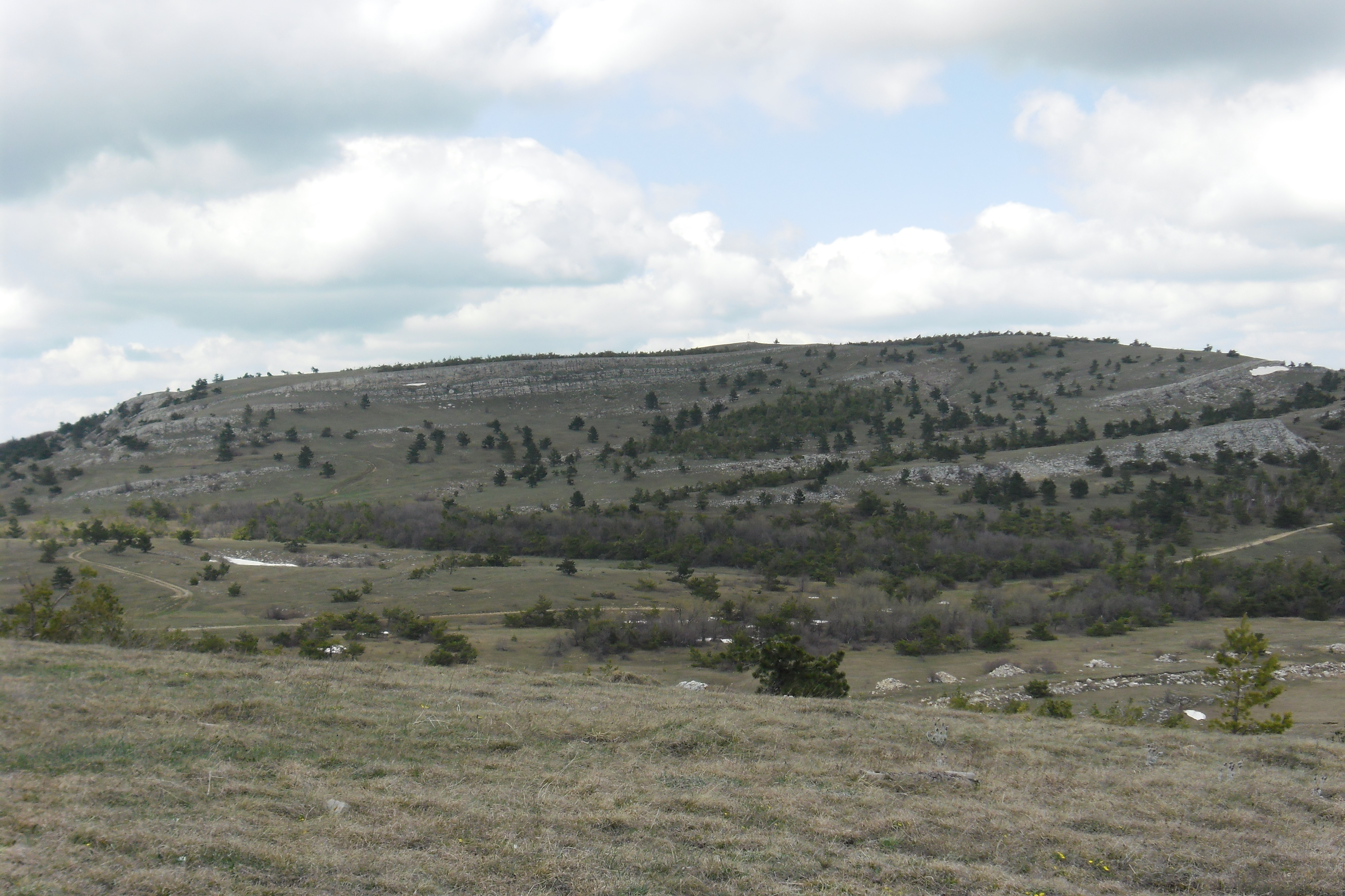 Фото